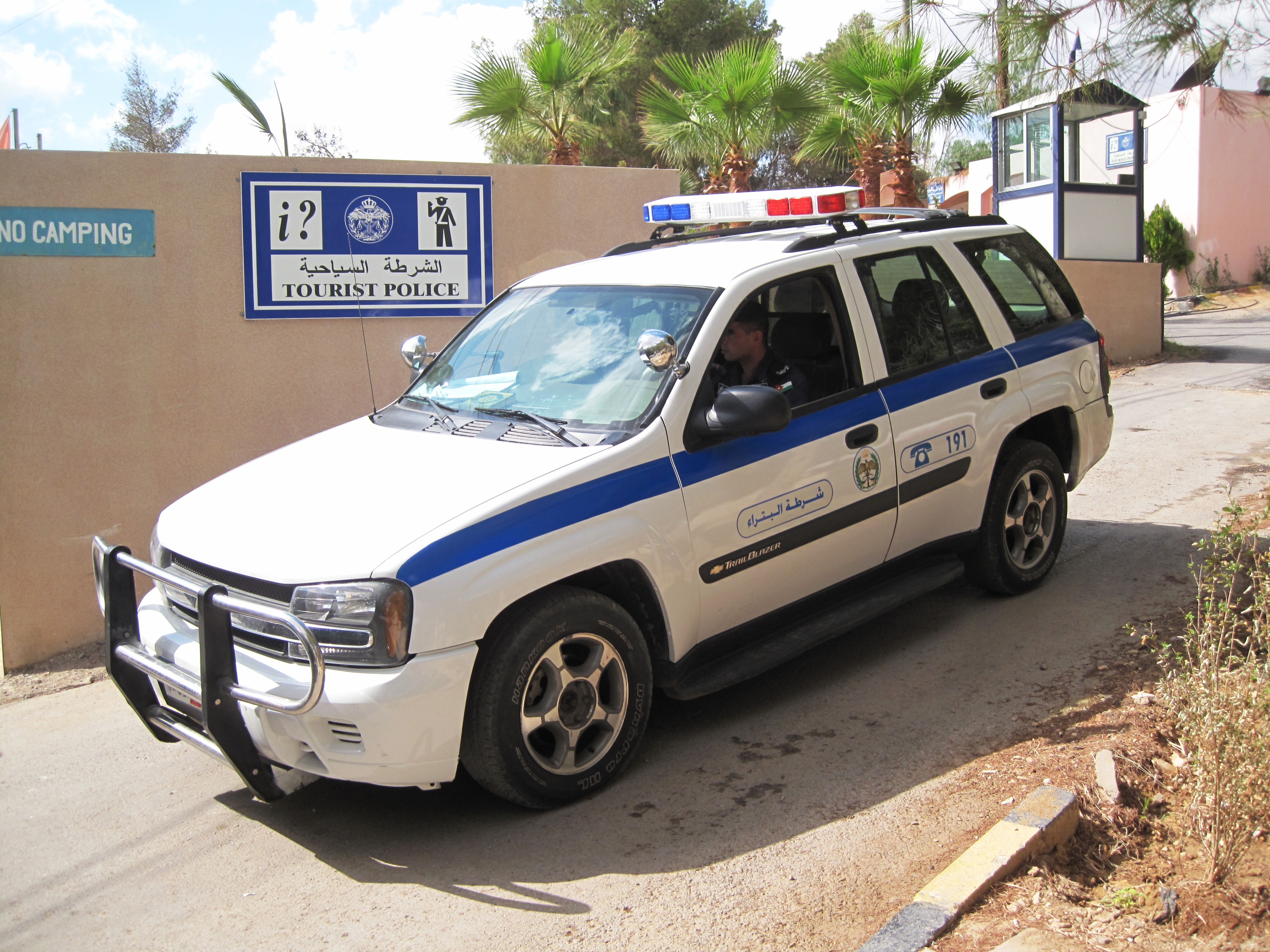 2002-2003 Chevrolet TrailBlazer - Politie in Jordanië